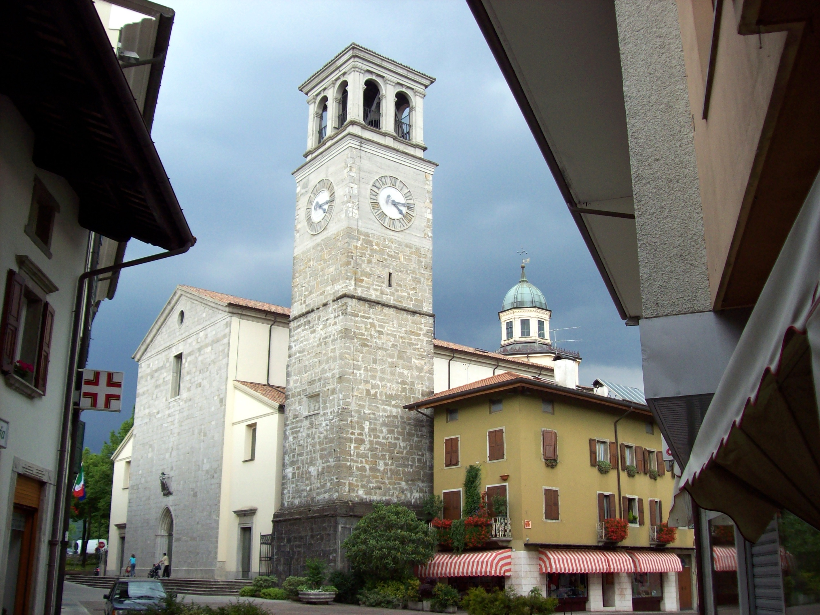 Tarcento (UD-Italy) la Chiesa di San Pietro